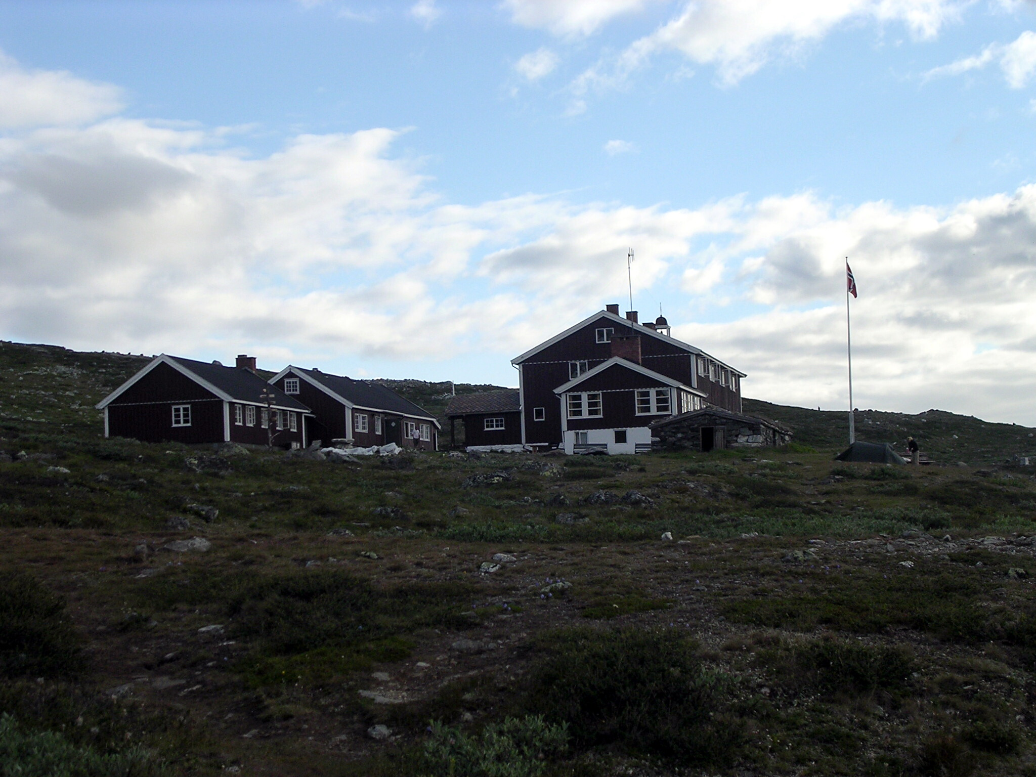 Glitterheim, a cabin in Jotunheimen, Norway.